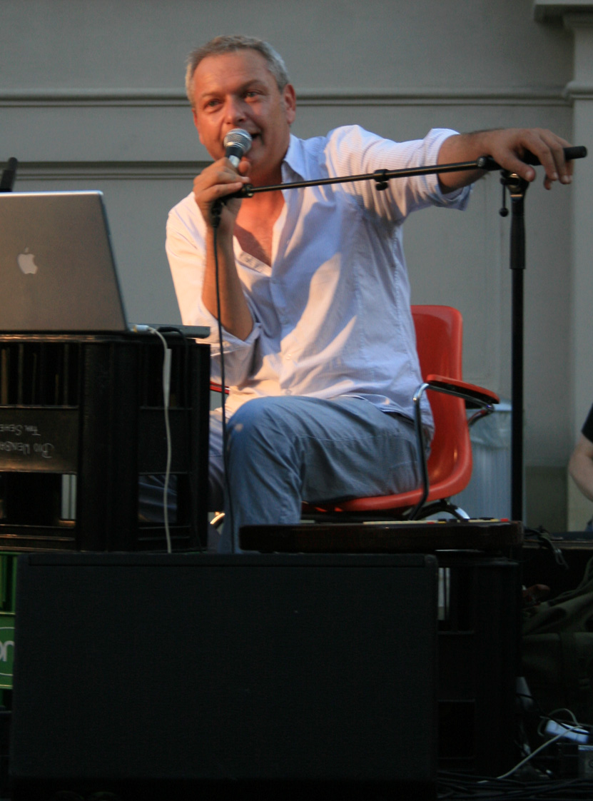 Fritz Ostermayer - Neigungsgruppe Sex, Gewalt und Gute Laune